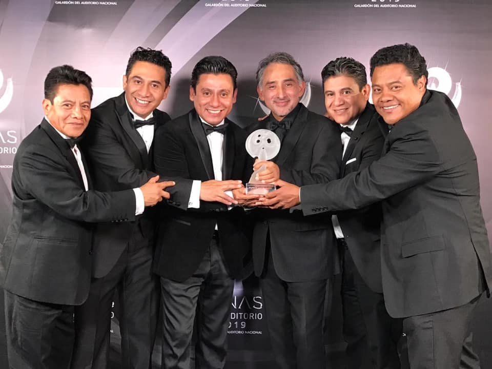 Big Band Jazz de México ganadores de las Lunas del Auditorio 2019